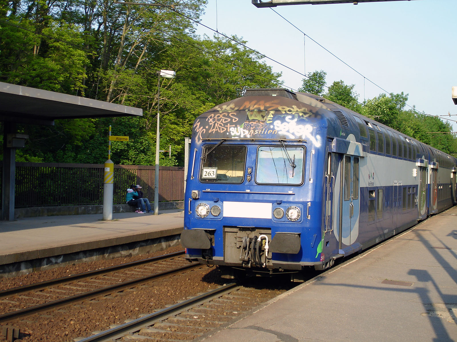 La gare d'Osny, Val-d'Oise, France.